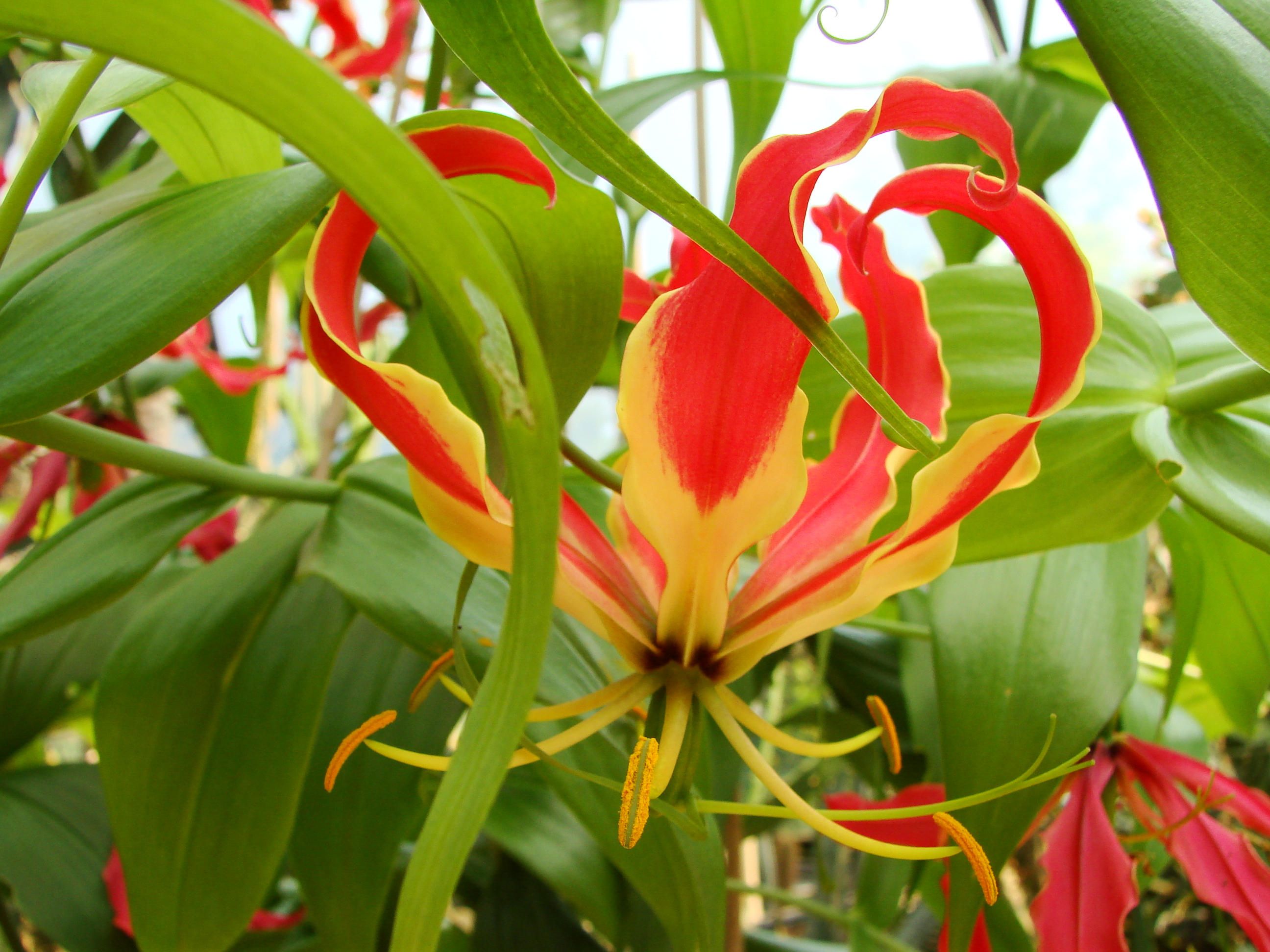 Jardin botanique de l'Université de Zurich (Suisse) : Gloriosa superba L.